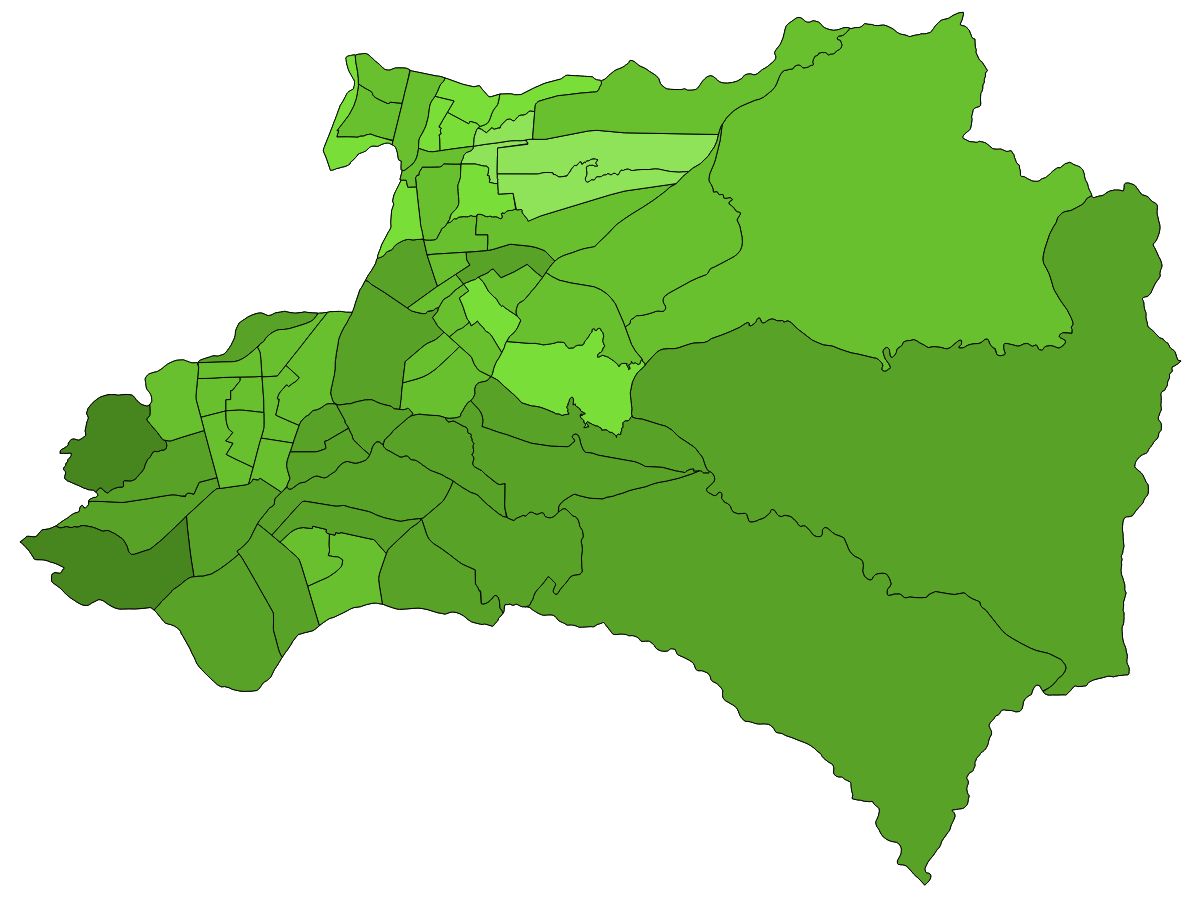 顏色對照表